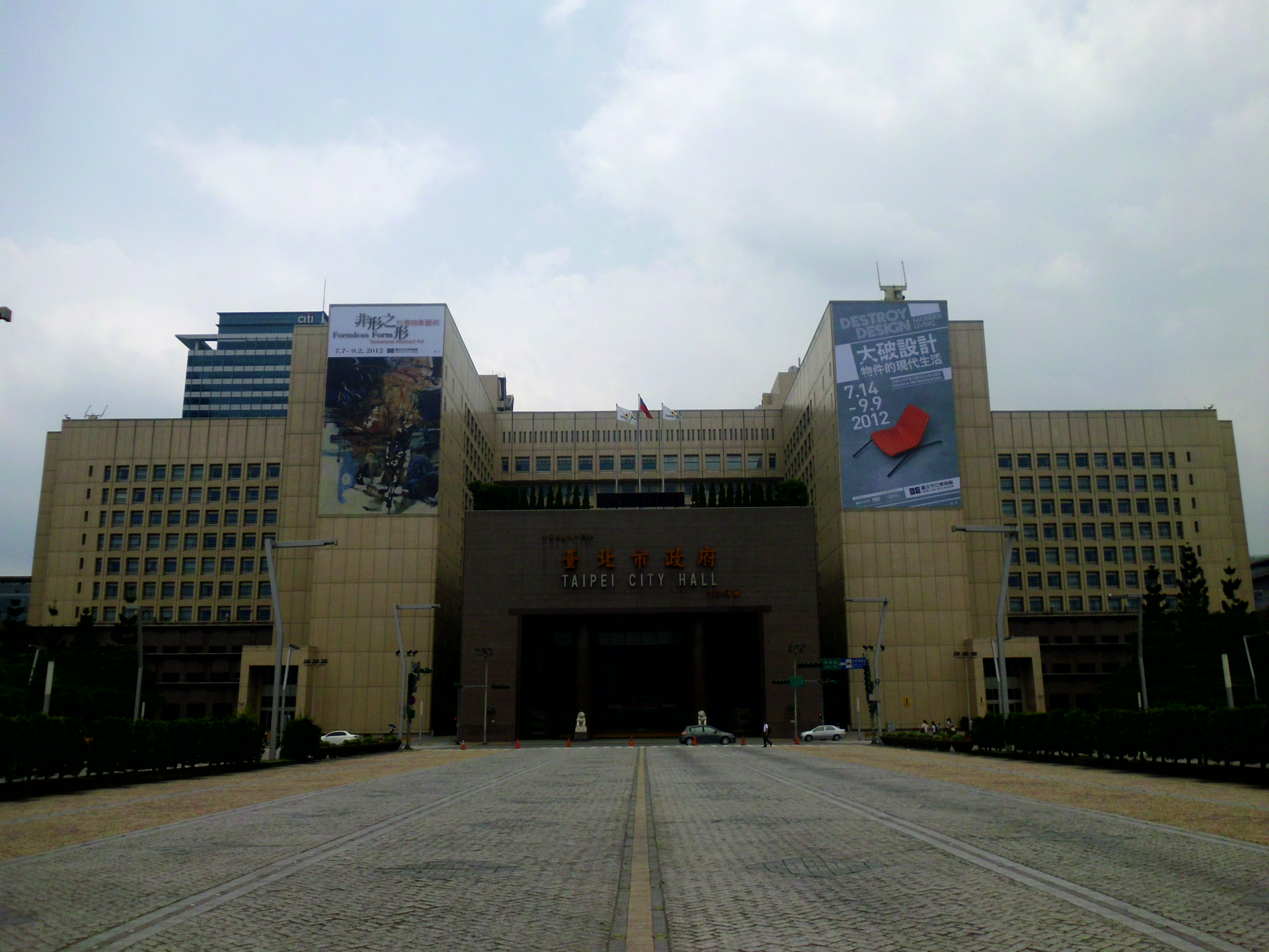 中文（台灣）: 臺北市市政大樓正面。